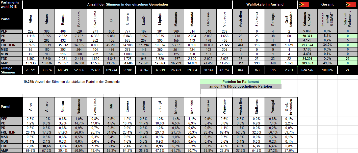 Ergebnis der Parlamentswahl 2018 in Osttimor nach Gemeinden aufgeteilt. Informationen nach CNE